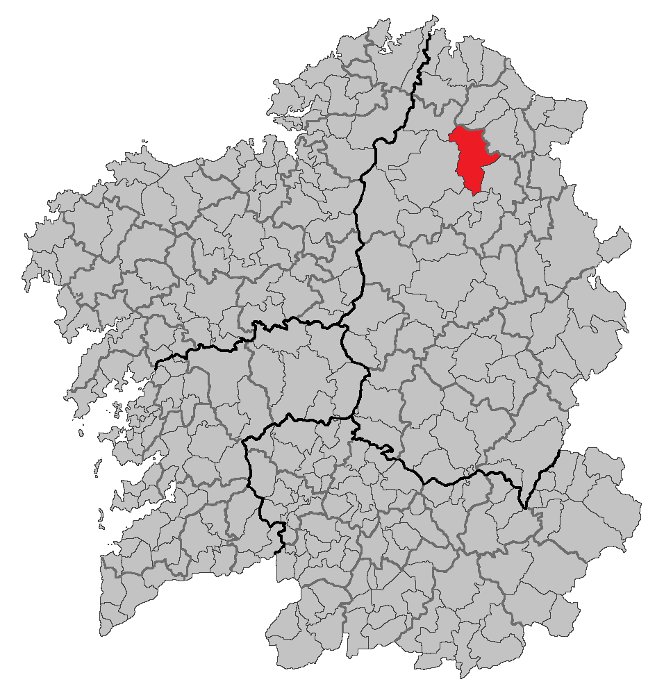 Mapa coa localización do concello de Abadín.